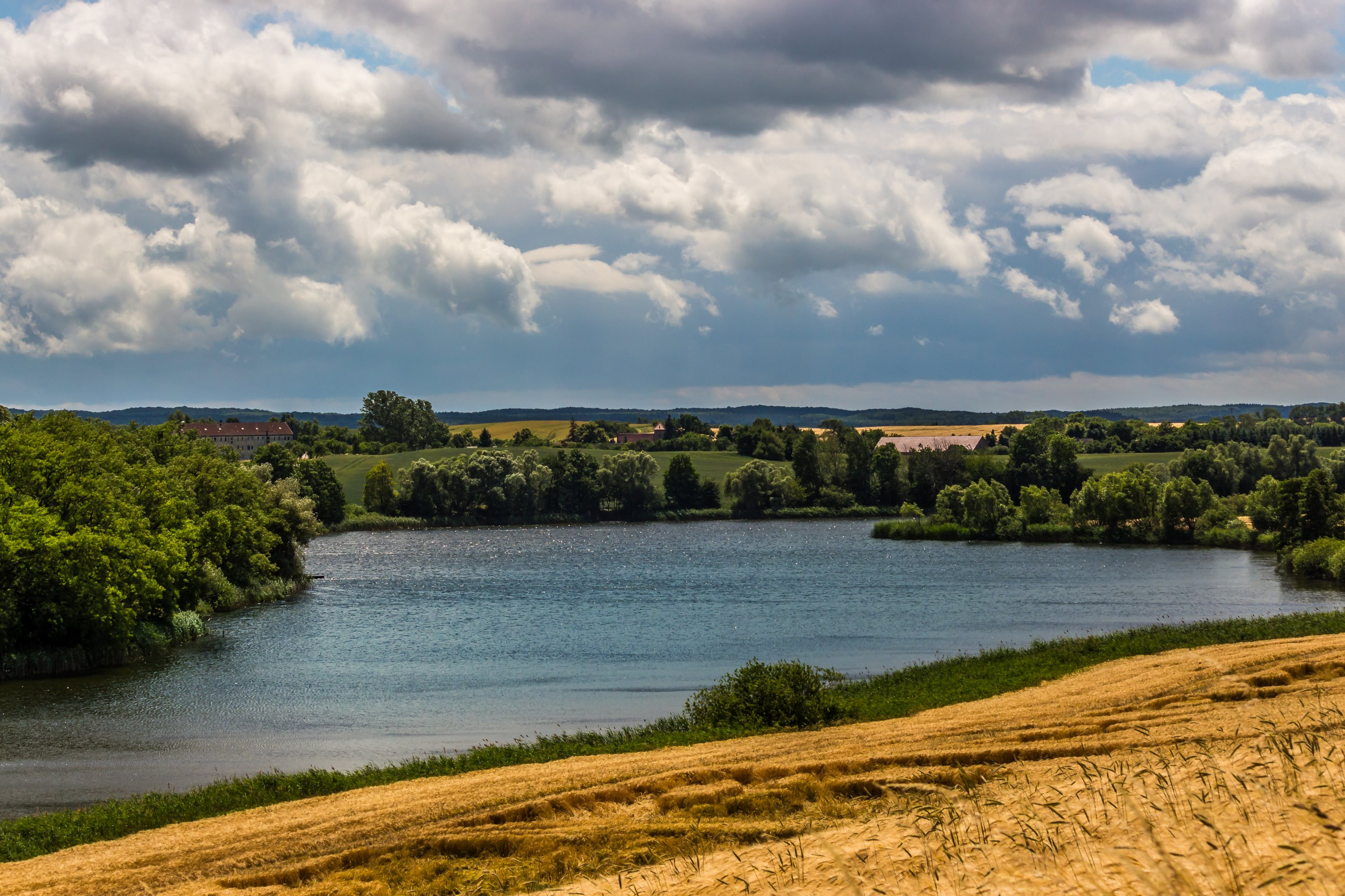 Krummer See bei Bölkendorf